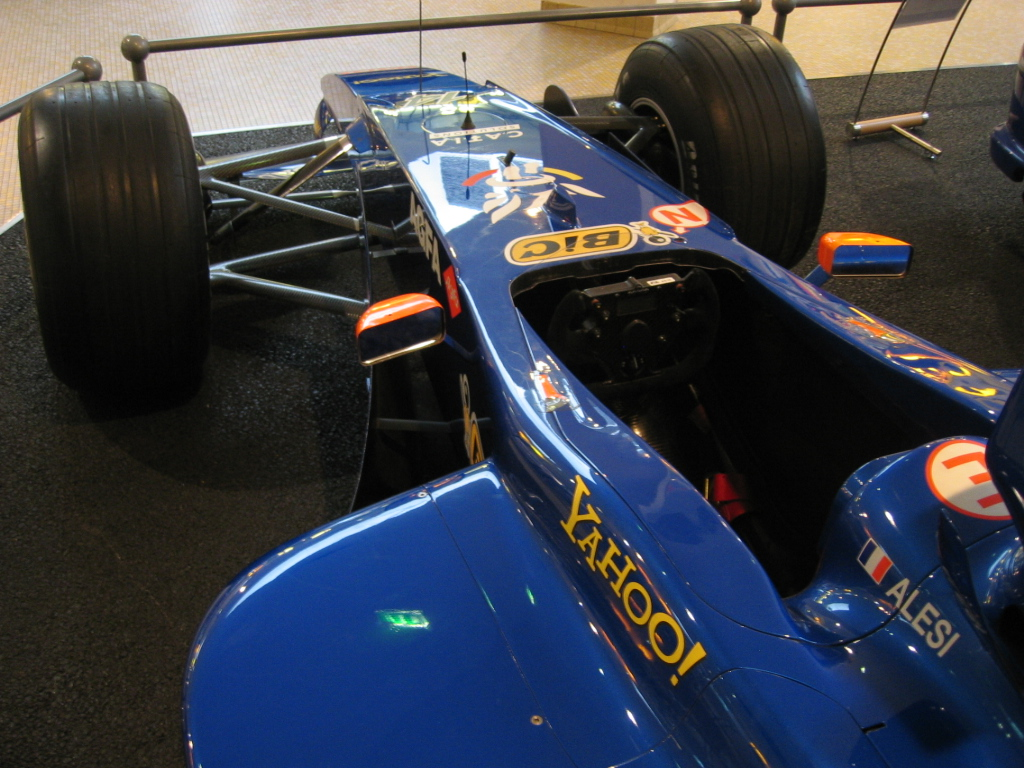 Formule 1 Prost Grand Prix - Musée Peugeot Sochaux